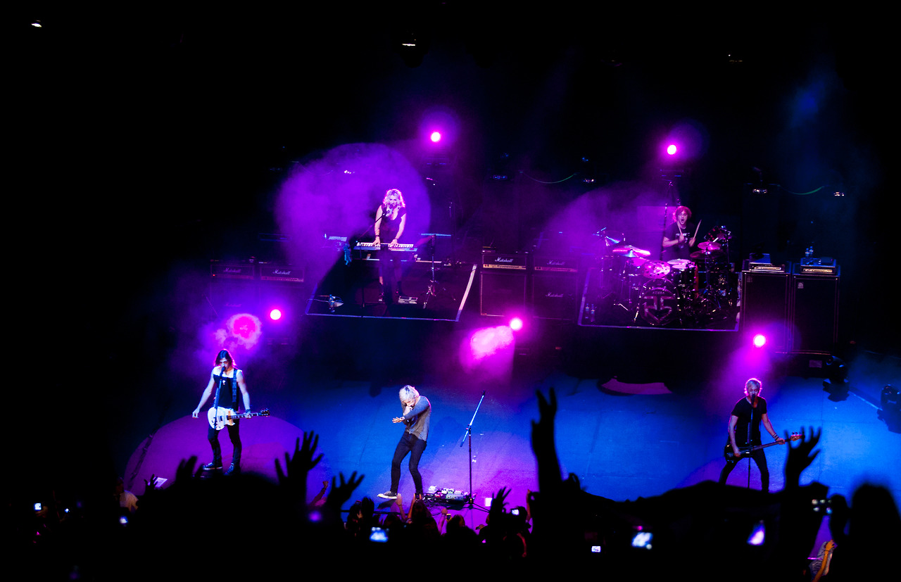 R5 en Argentina el día 8/10/2014 en el Teatro Opera Allianz